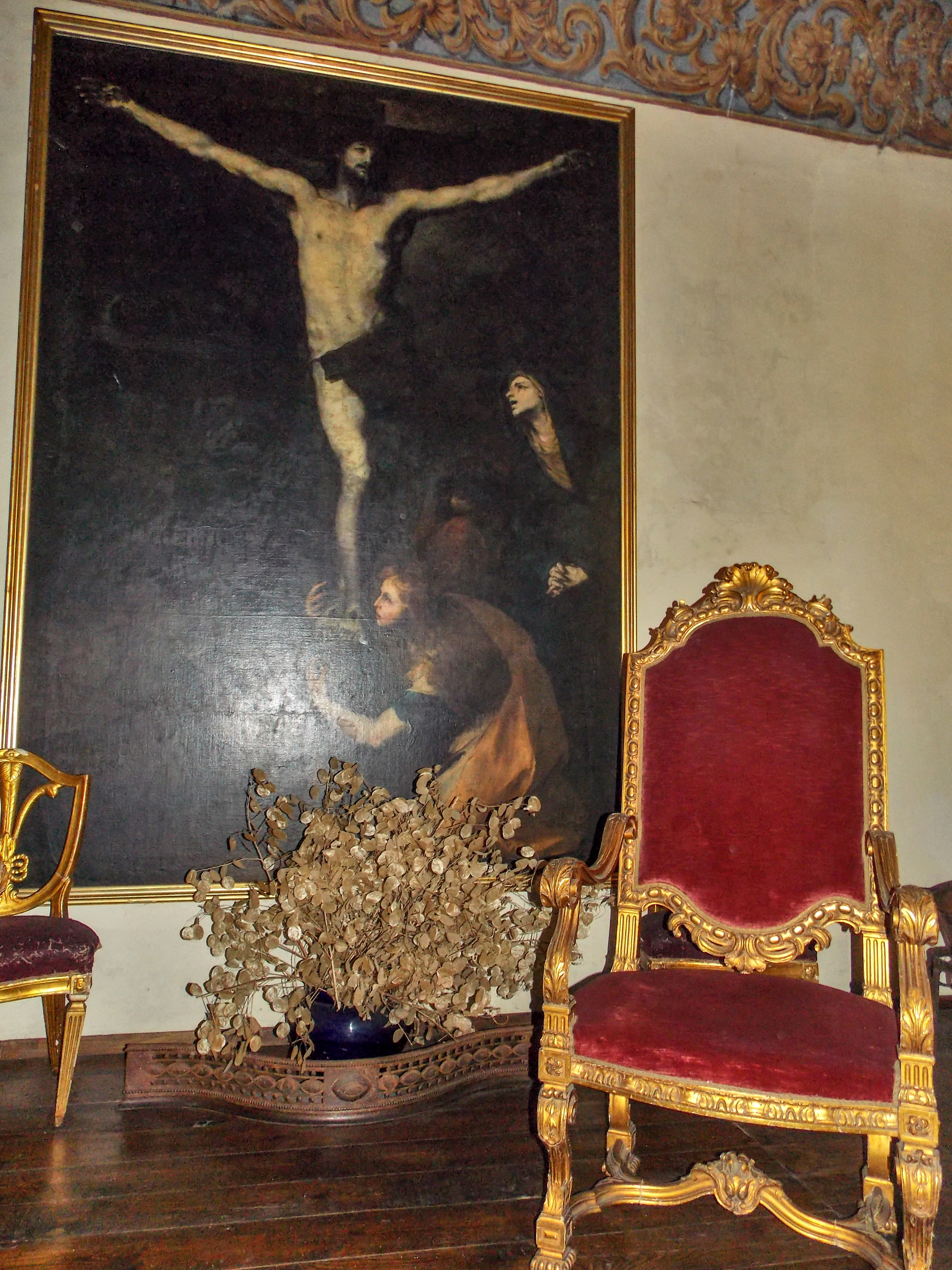 Castello Pignatelli della Leonessa a San Martino Valle Caudina (AV).